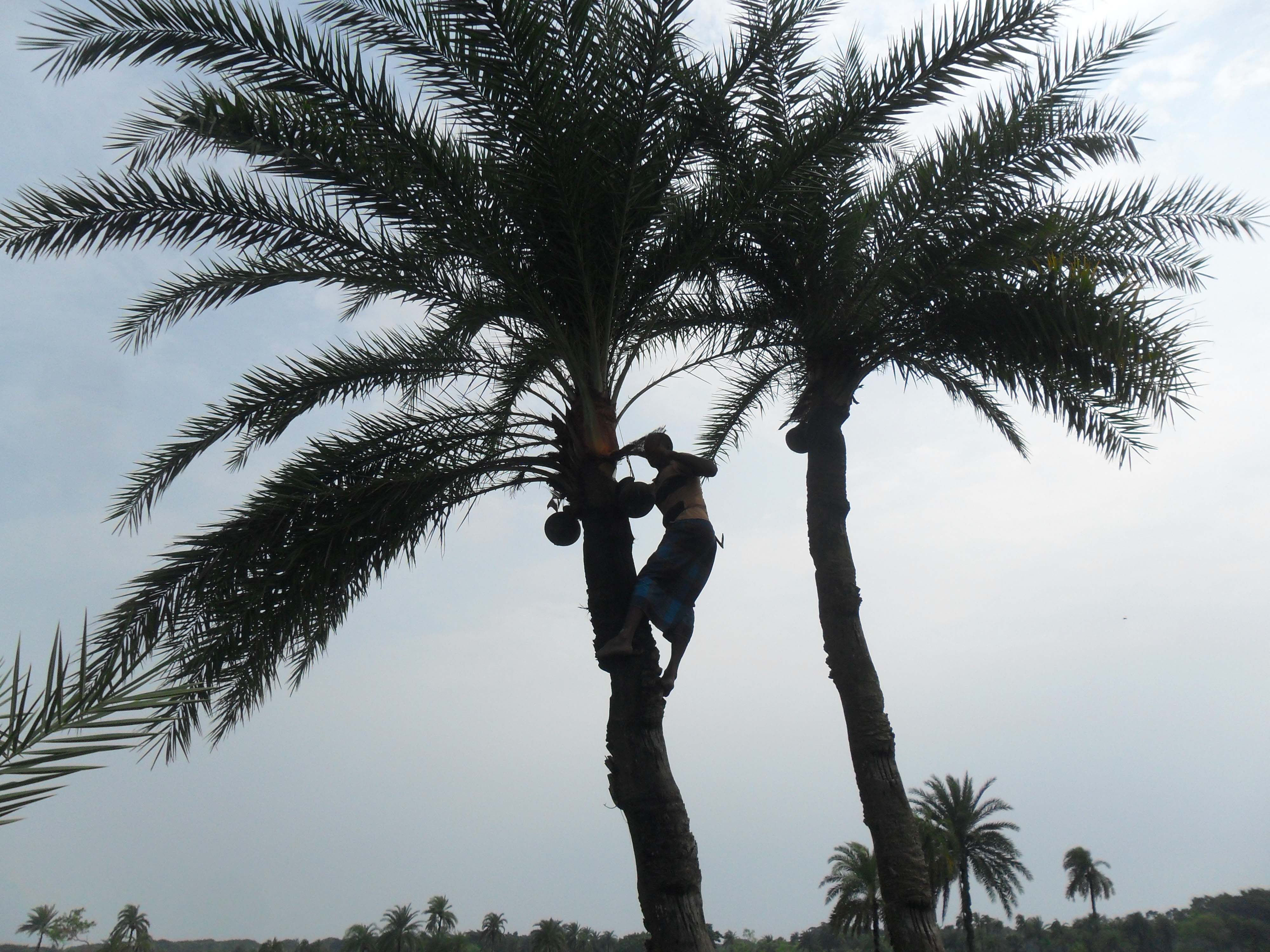 ছবিটি যশোর জেলার মণিরামপুর থানার ব্রাহ্মণডাঙ্গা গ্রামের মাঠ থেকে ২৫ই সেক্টেম্বর ২০১৪ তারিখে তোলা। যশোর বিক্ষাত খেজুরের রস ও গুড়ের জন্য। যশোরের রাস্তার পাশে এবং ক্ষেতের মাঝে অগোছালো ভাবে ছড়িয়ে ছিটিয়ে আছে খেজুরের গাছ। শীত আসতে না আসতেই আরম্ভ হয়েছে খেজুরের গাছকাটা(রস বের করার প্রক্রিয়া)। ছবিতে তেমনি একটি খেজুরের গাছে আমরা গাছিকে ভাড় পাতাতে(পাত্র ঝোলাতে) দেখতে পাচ্ছি। শীতের সকালে যখন চারিদিকে কুয়াশাচ্ছন্ন থাকে ঠিক তখনই গাছিরা(যারা গাছ কাটেন) বের হয় গতদিনে পাতা ভাড়ের রস সংগ্রহ করতে।